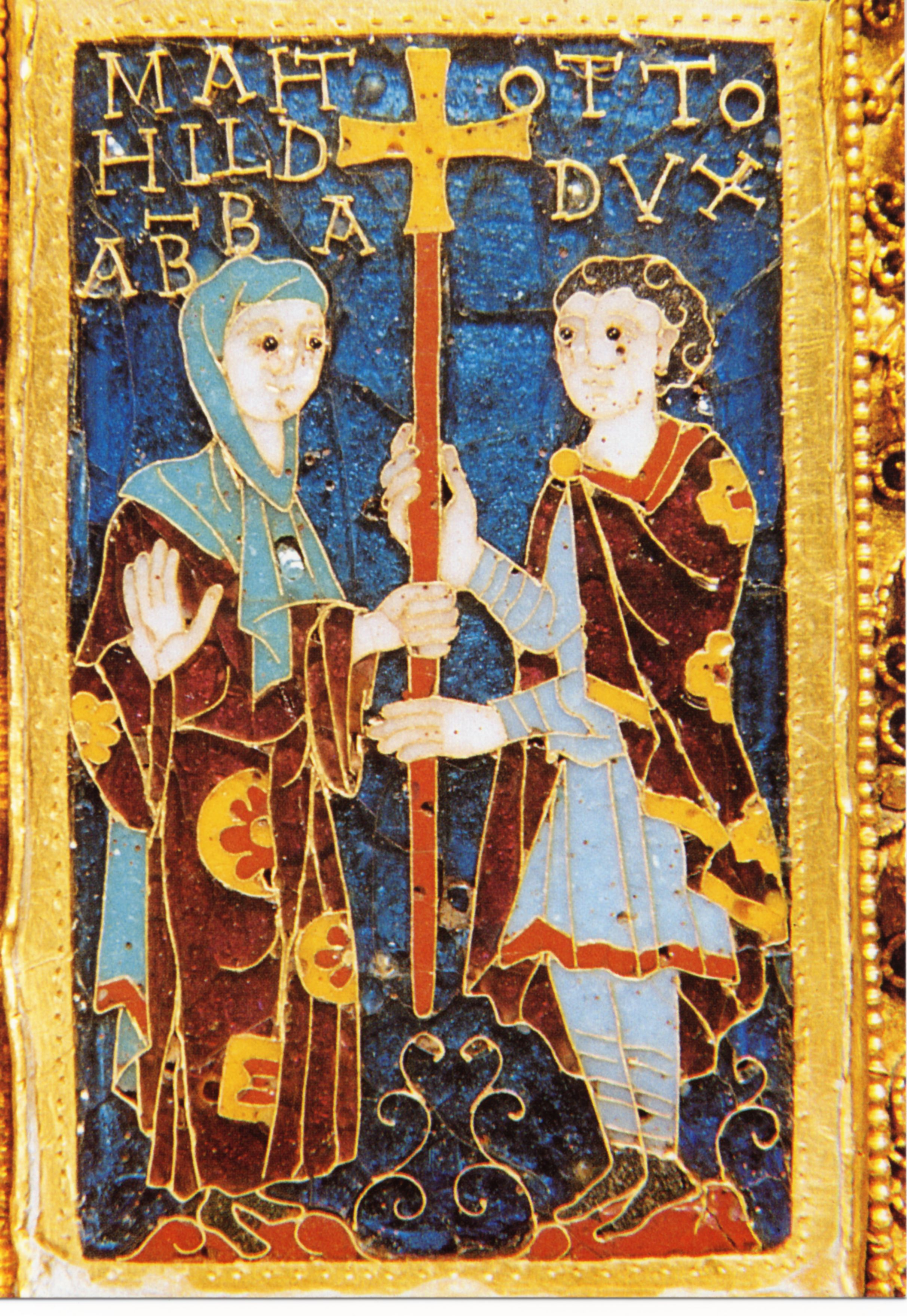 Stifterplatte des Otto-Mathilden-Kreuzes, ottonisches Email um 982: Mathilde mit ihrem Bruder Otto.